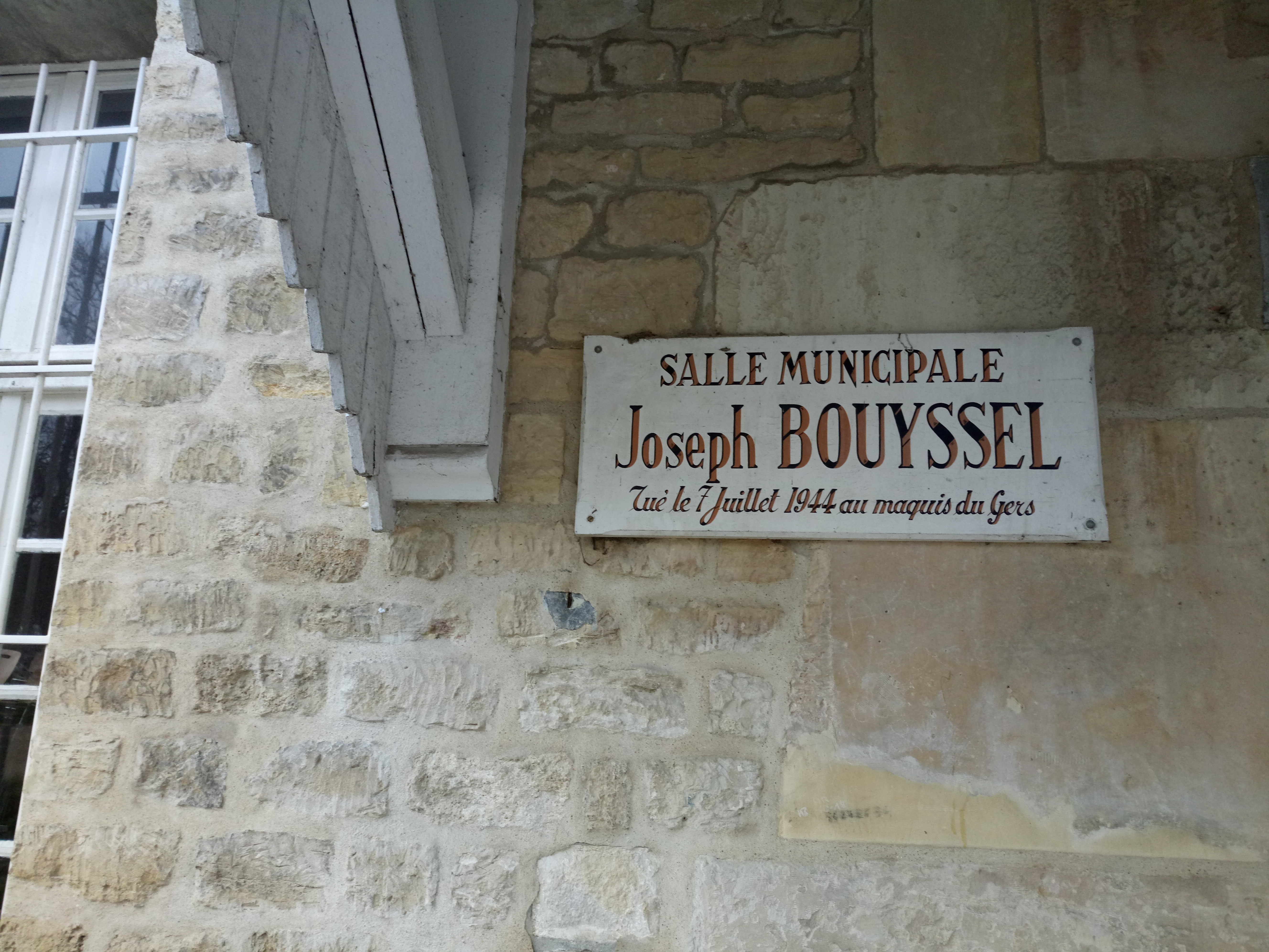 Plaque à la mémoire de Joseph Bouyssel à Conflans st Honorine - France - 78 ; sur une salle municipale au nom de Bouyssel